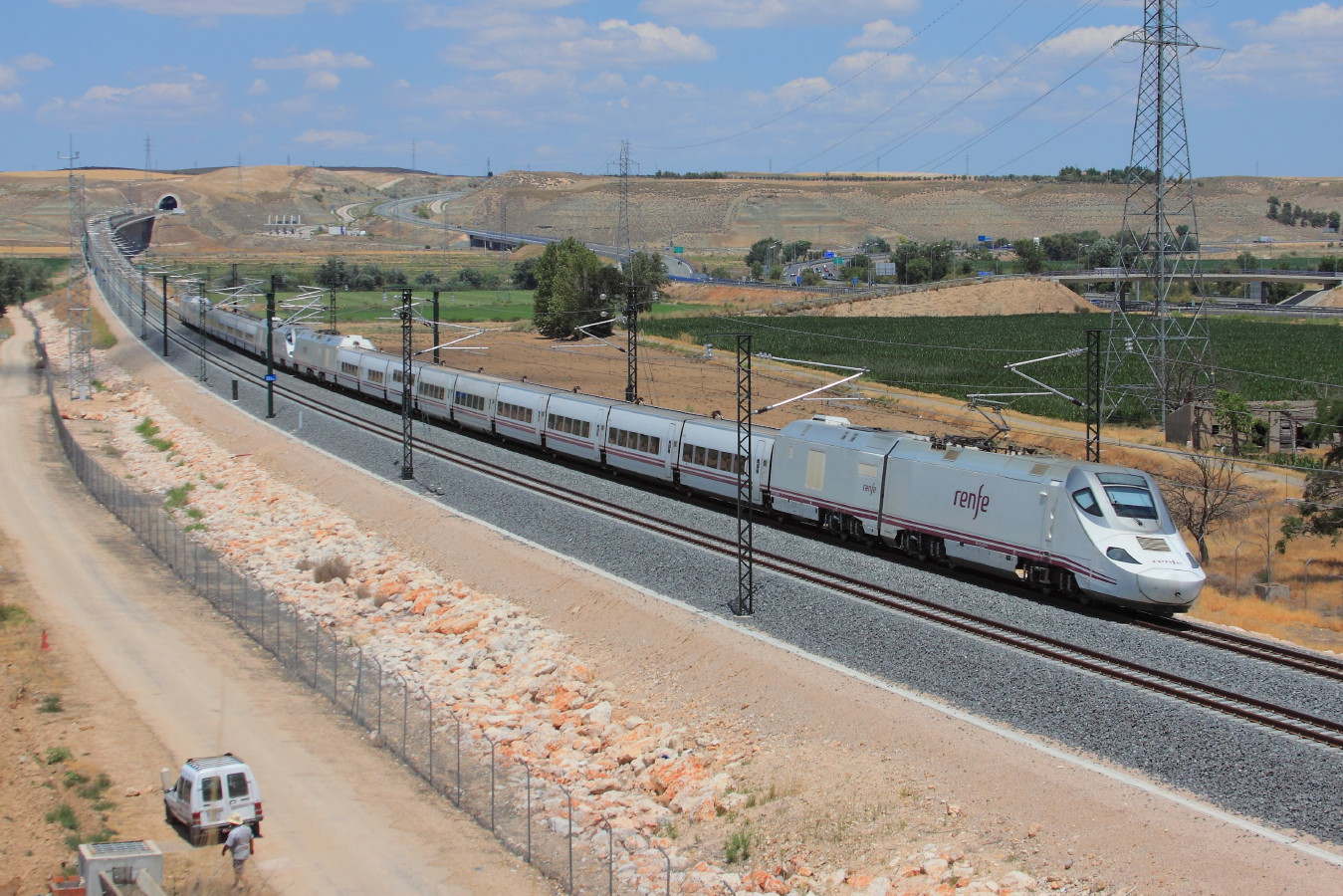 LAV de Levante. Aranjuez. automotor 730 en doble con la ruta Alicante, Madrid y Galicia.